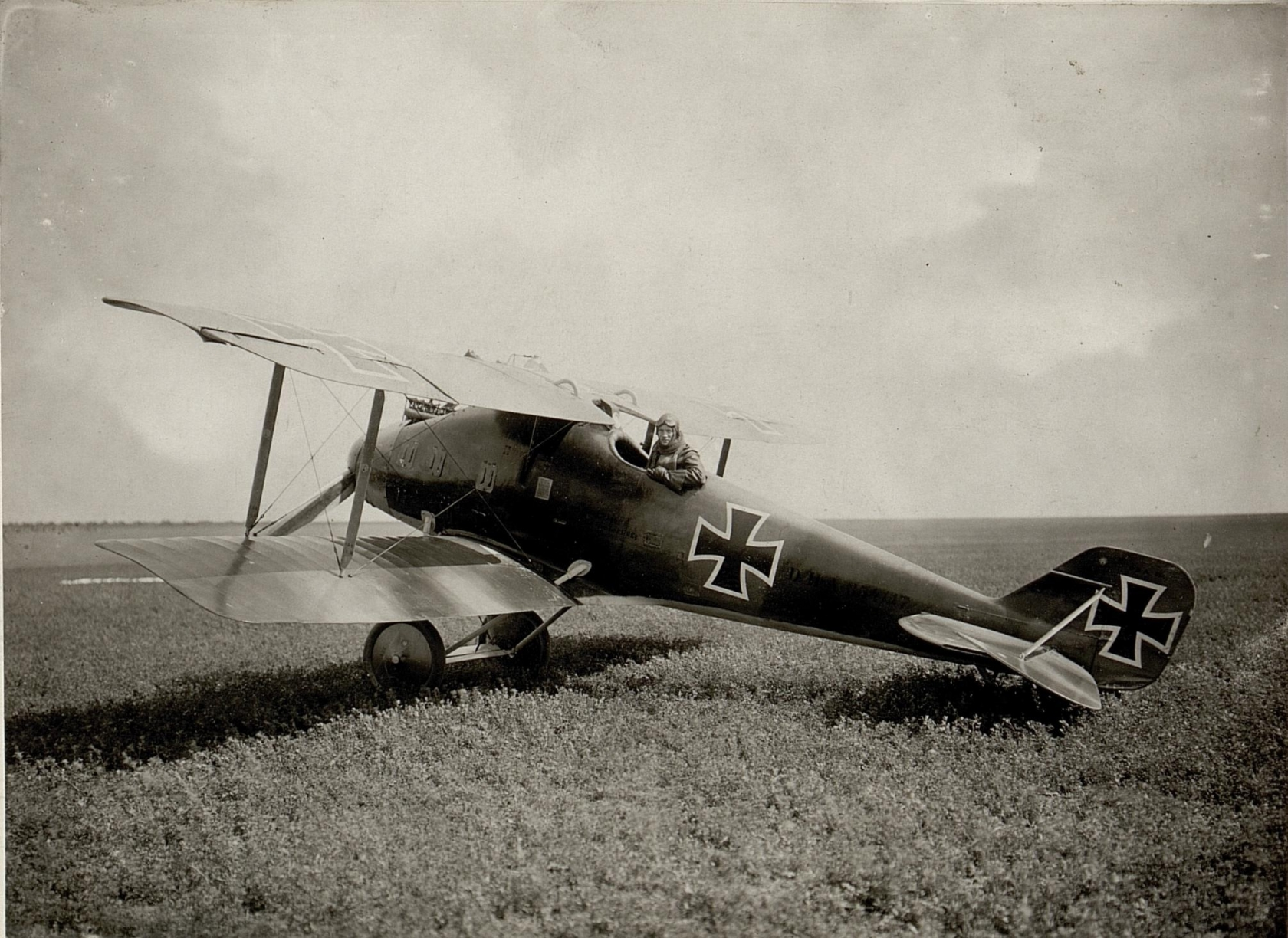 Am Flugplatze